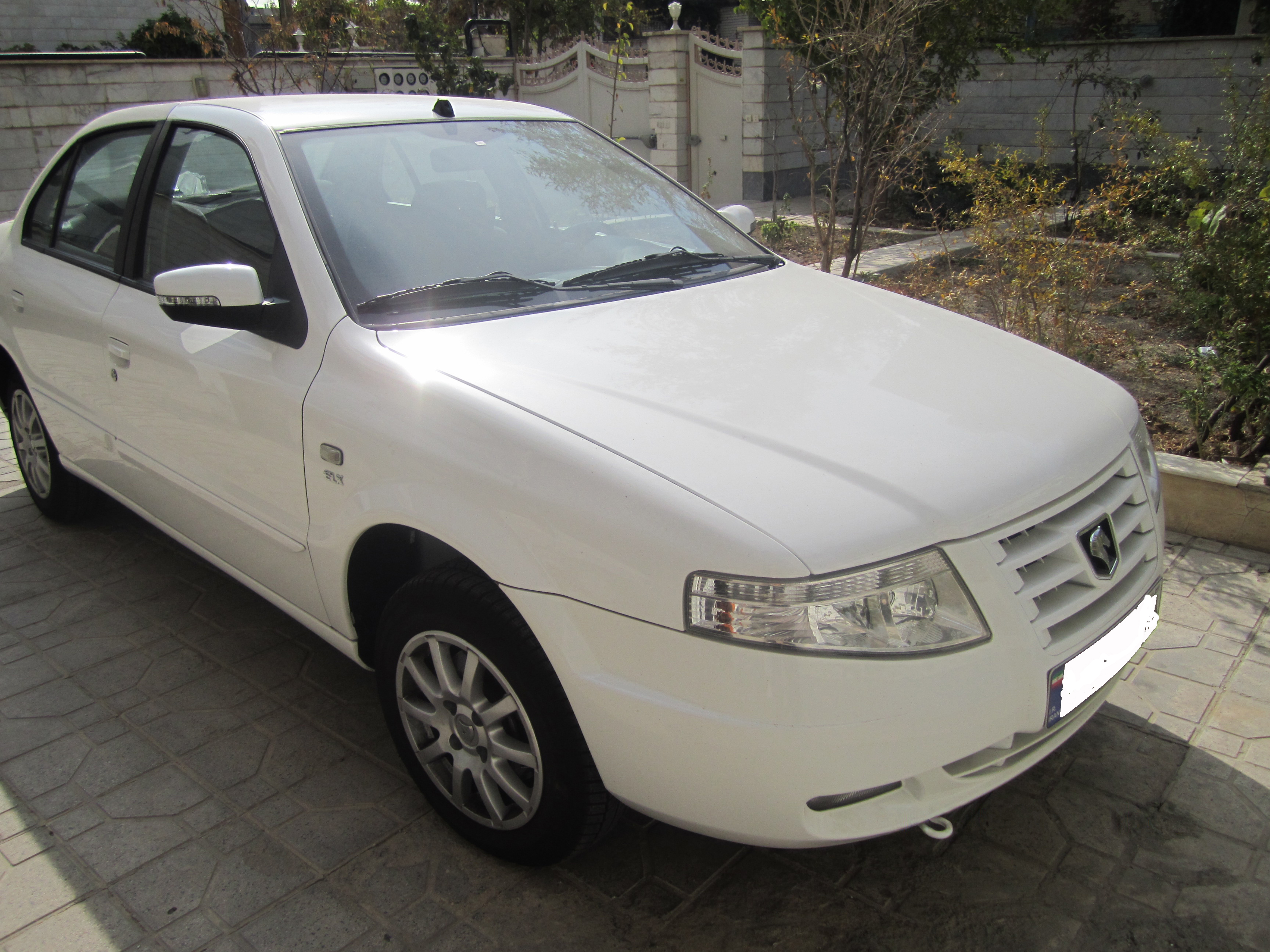 سورن ئی ال ایکس، نمای سه رخ